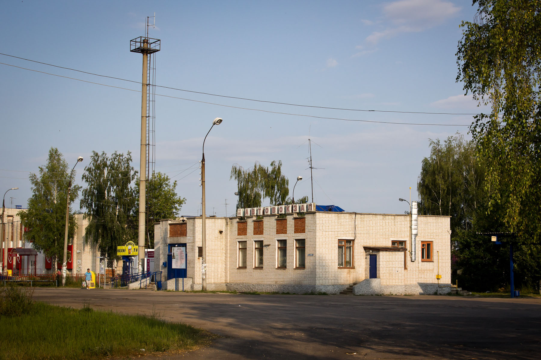 Автовокзал (2012.07.10)